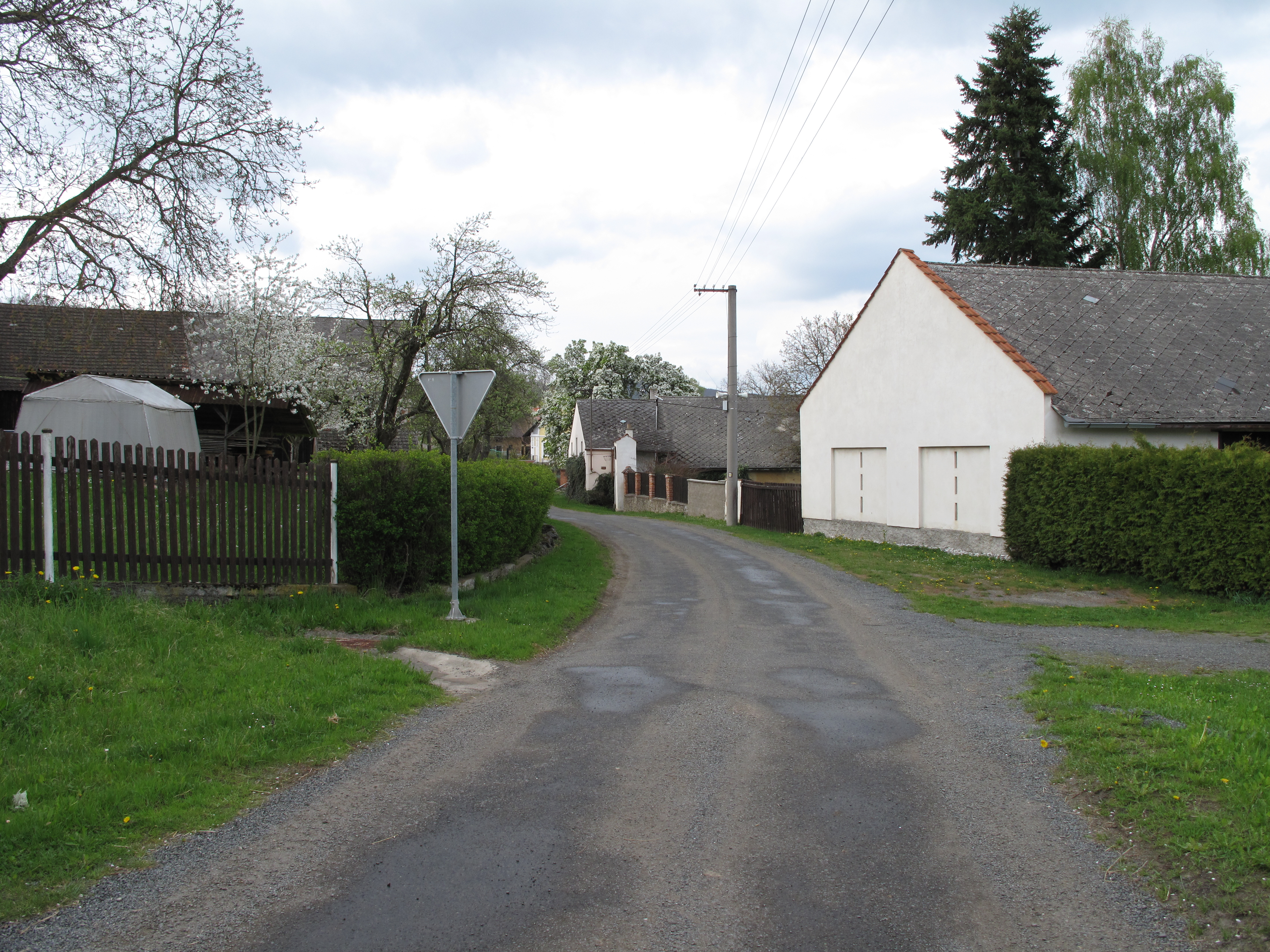 Řakom. Okres Klatovy, Česká republika.